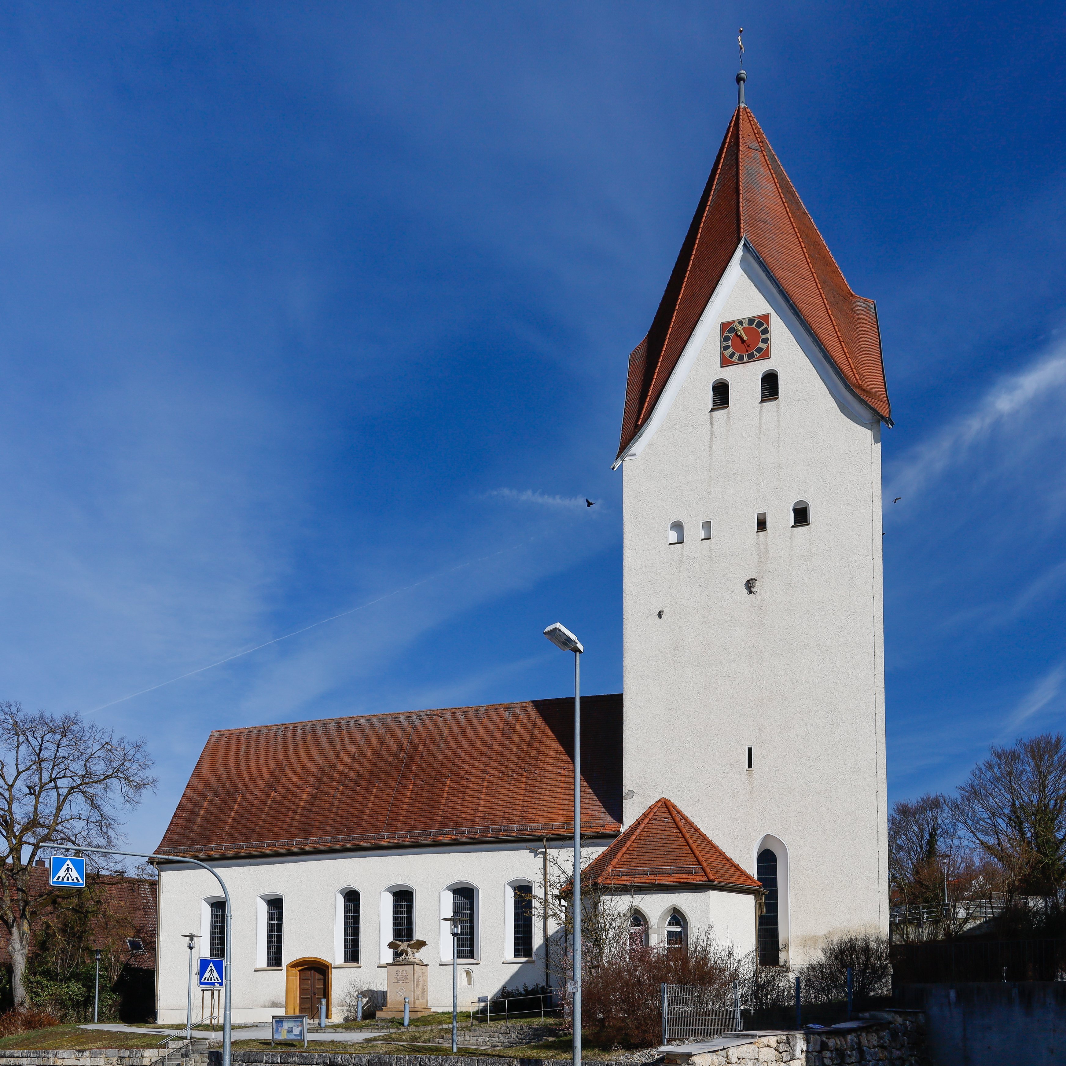 Marienkirche Lonsee, Baden-Württemberg, Germany